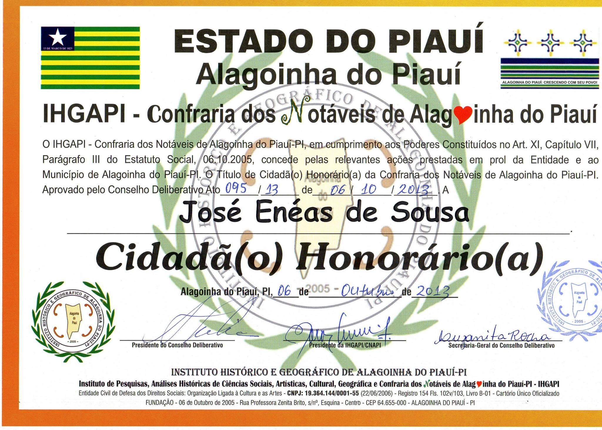 jose.eneas.título.honorário